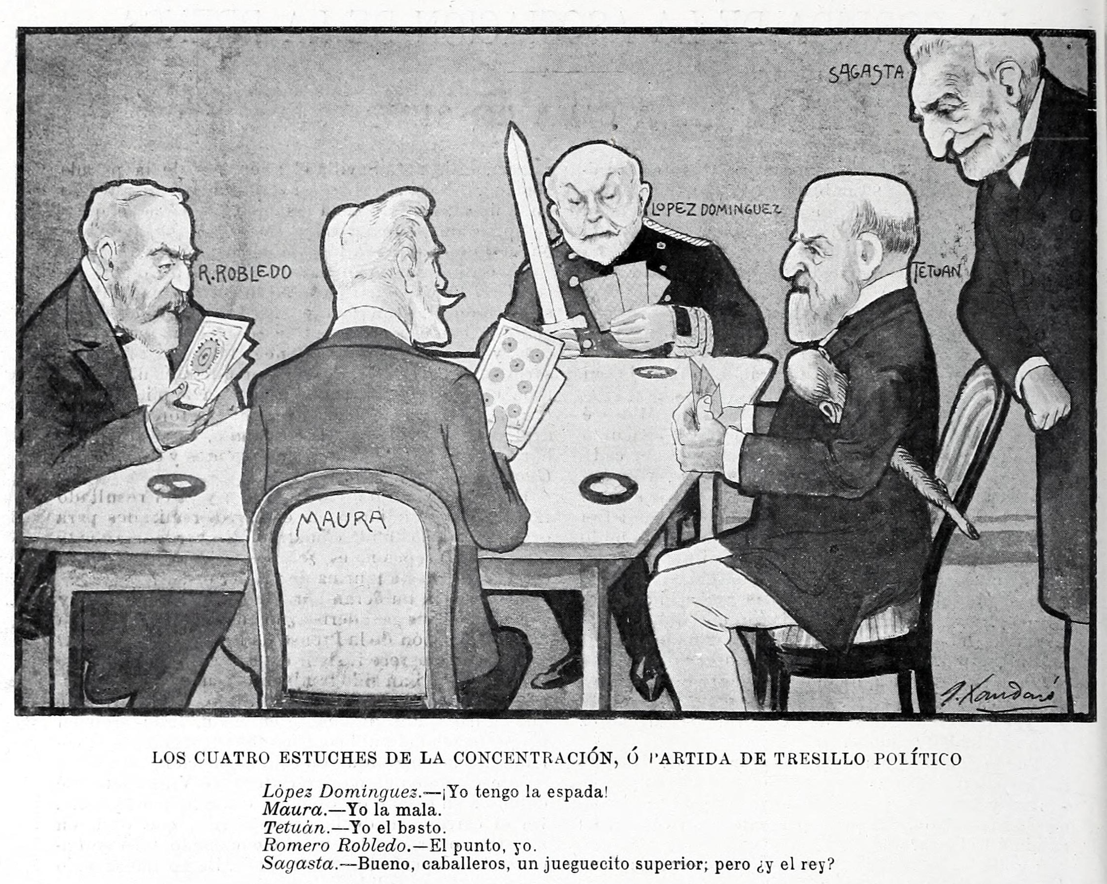 Los cuatro estuches de la concentración ó partida de tresillo político, por Xaudaró.López Domínguez.—¡Yo tengo la espada!Maura.—Yo la mala.Tetuán.—Yo el basto.Romero Robledo.—El punto, yo.Sagasta.—Bueno, caballeros, un jueguecito superior, pero y el rey?